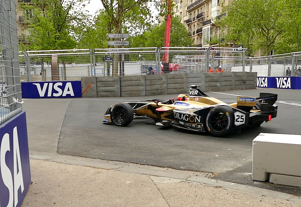 Paris ePrix 2018 Jean-Éric Vergne remporte la course sur Techeetah N° 25. (Extrait vidéo)